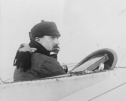 French aviator Jean Louis Conneau a.k.a. André Beaumont (1880-1937)